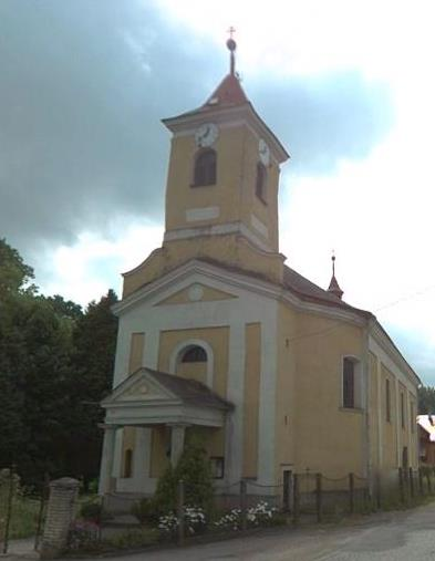 Třebařov, kostel